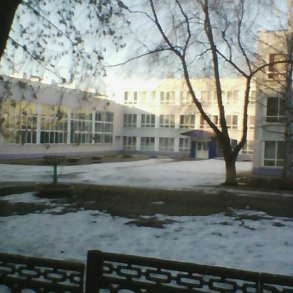 Татарча/tatarça: Яр Чаллы шәһәренең "Аерым предметлар тирәнтен өйрәнелә торган 19 нчы урта гомуми белем мәктәбе" гомуми белем муниципаль бюджет учреждениесе